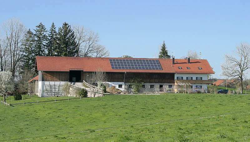 Bauernhof in für Oberbayern typischer Bauweise